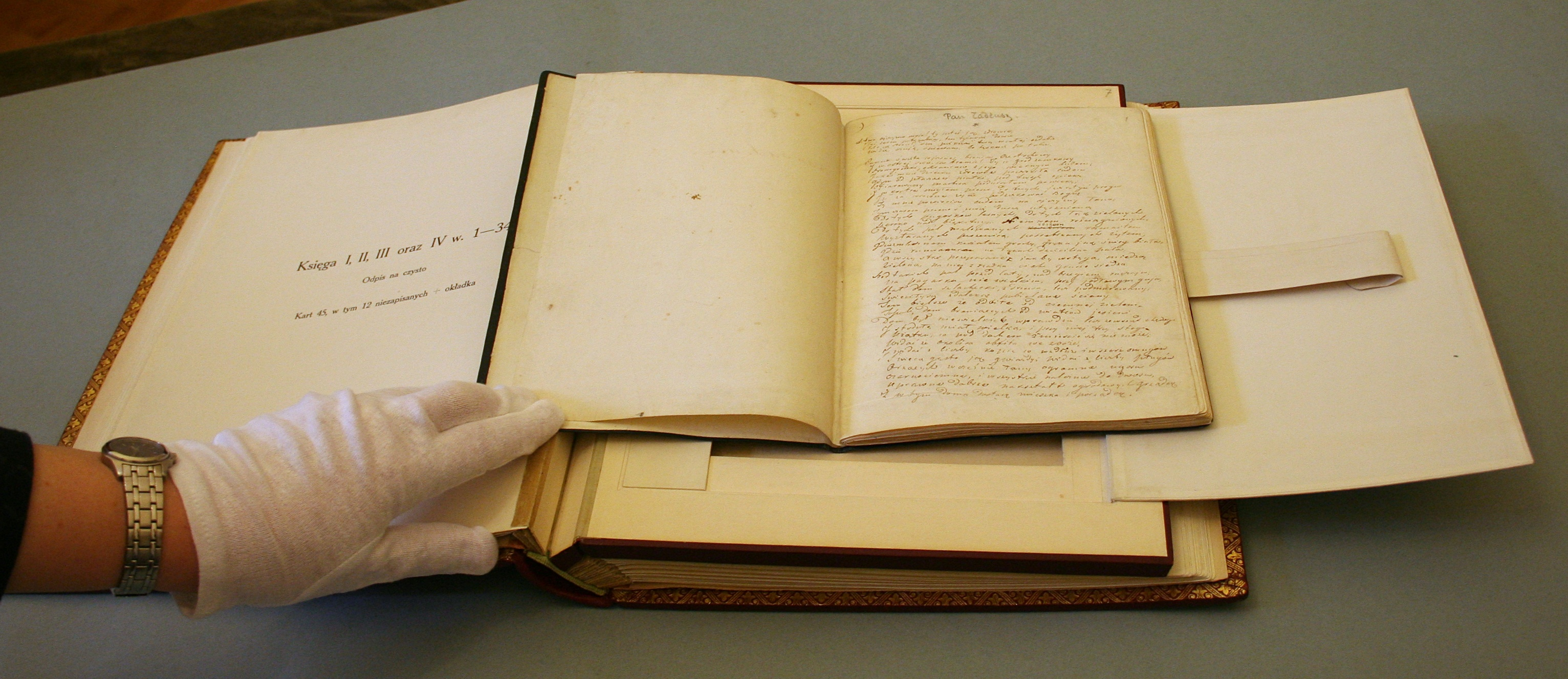 Rękopis Pana Tadeusza w zbiorach Zakładu Narodowego im. Ossolińskich we Wrocławiu.